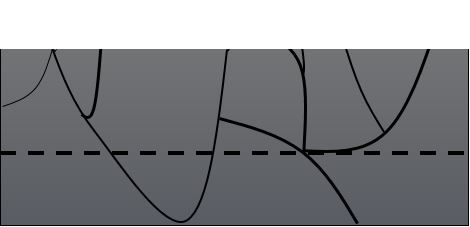 Defeitos na estrutura cristalina que podem permanecerem após ataque químico